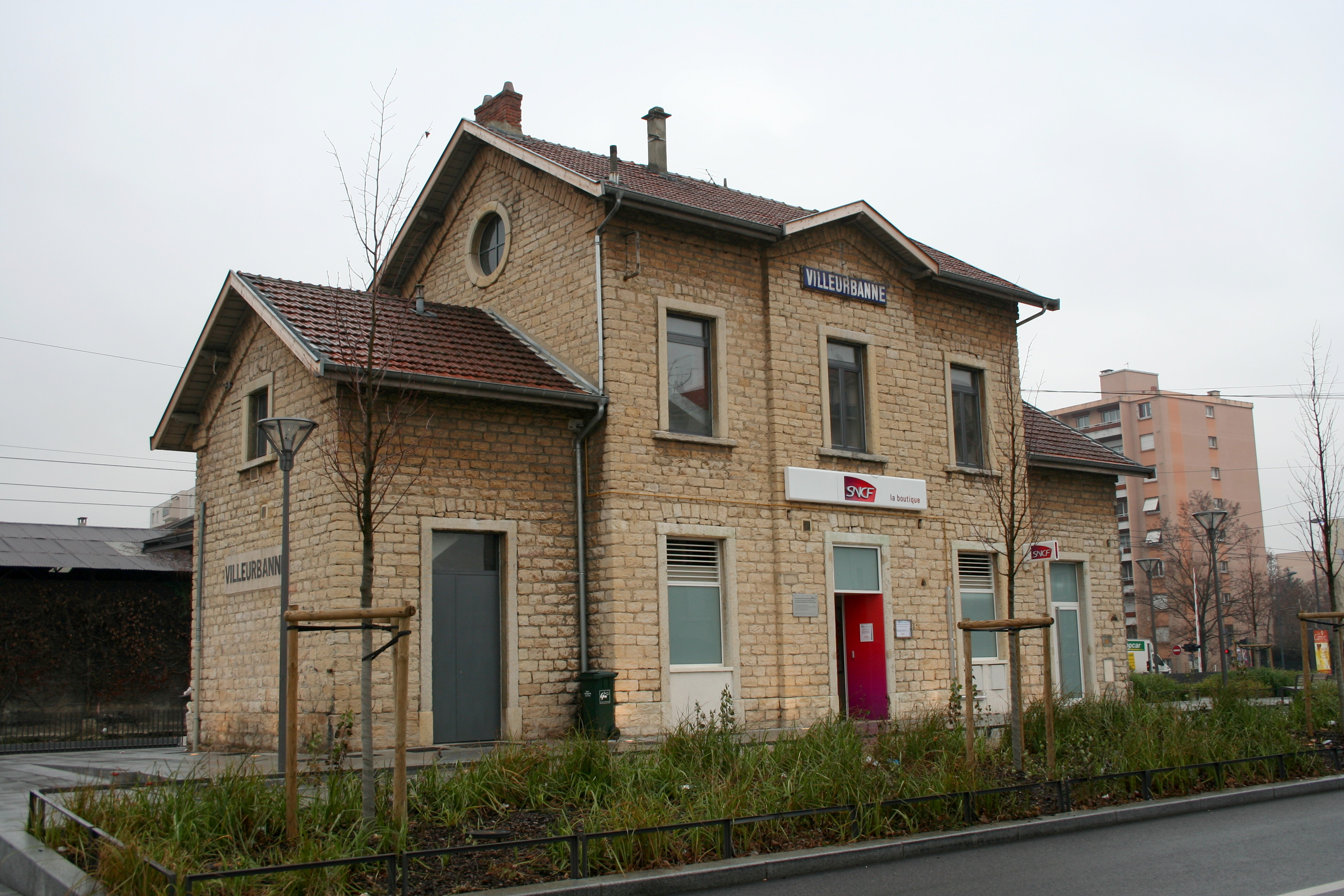 Bâtiment voyageurs de la gare de Villeurbanne, construit par les Chemins de fer de l'Est lyonnais (CFEL). Le bâtiment est utilisé par la SNCF et orne la station Gare de Villeurbanne de la ligne T3 du Tramway de Lyon